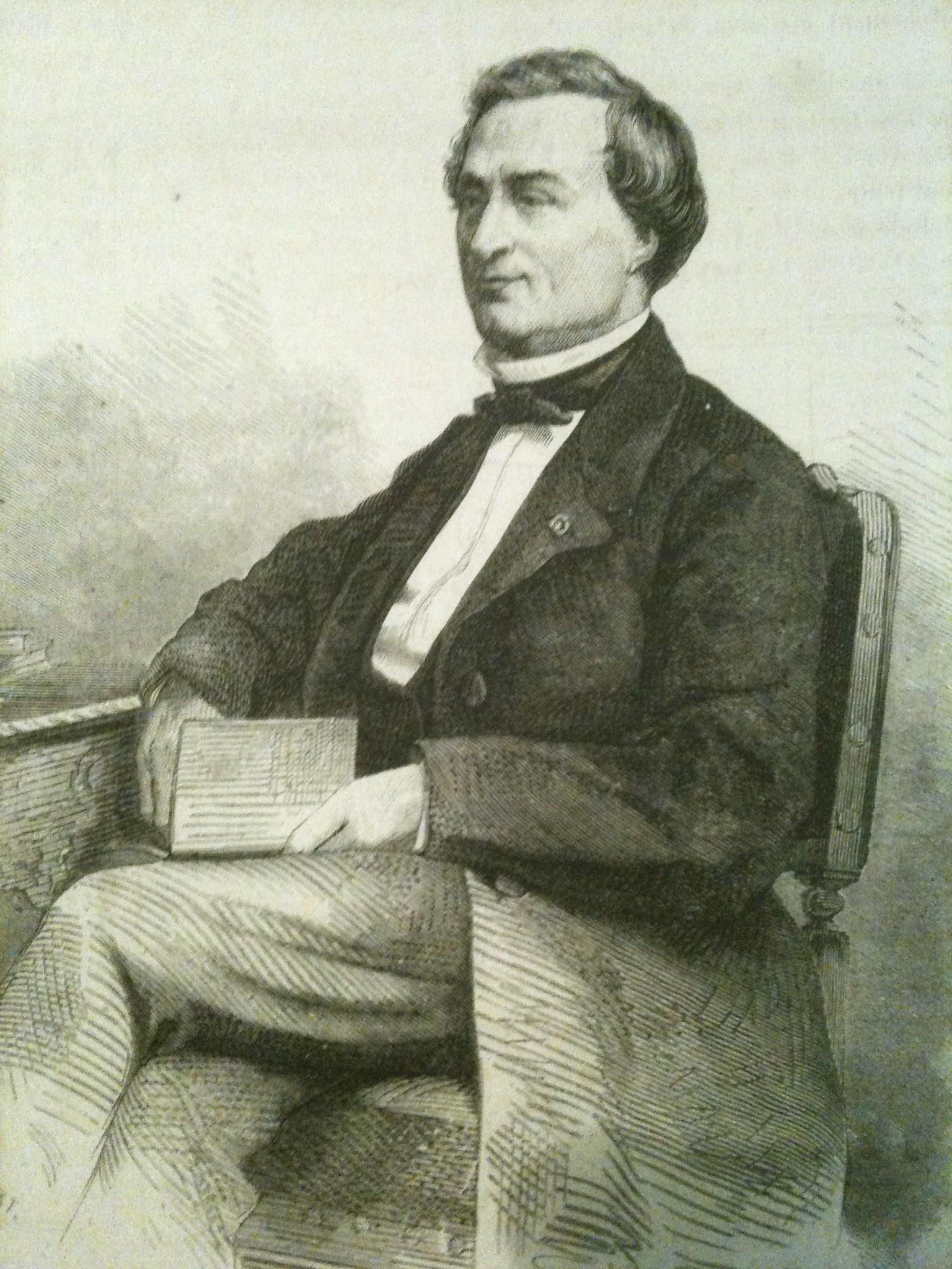 M. Bonjean, sénateur (discussion sur la Pologne) - d'après une photographie de M. Ken, in Le Monde illustré, 28 mars 1863, p. 1.